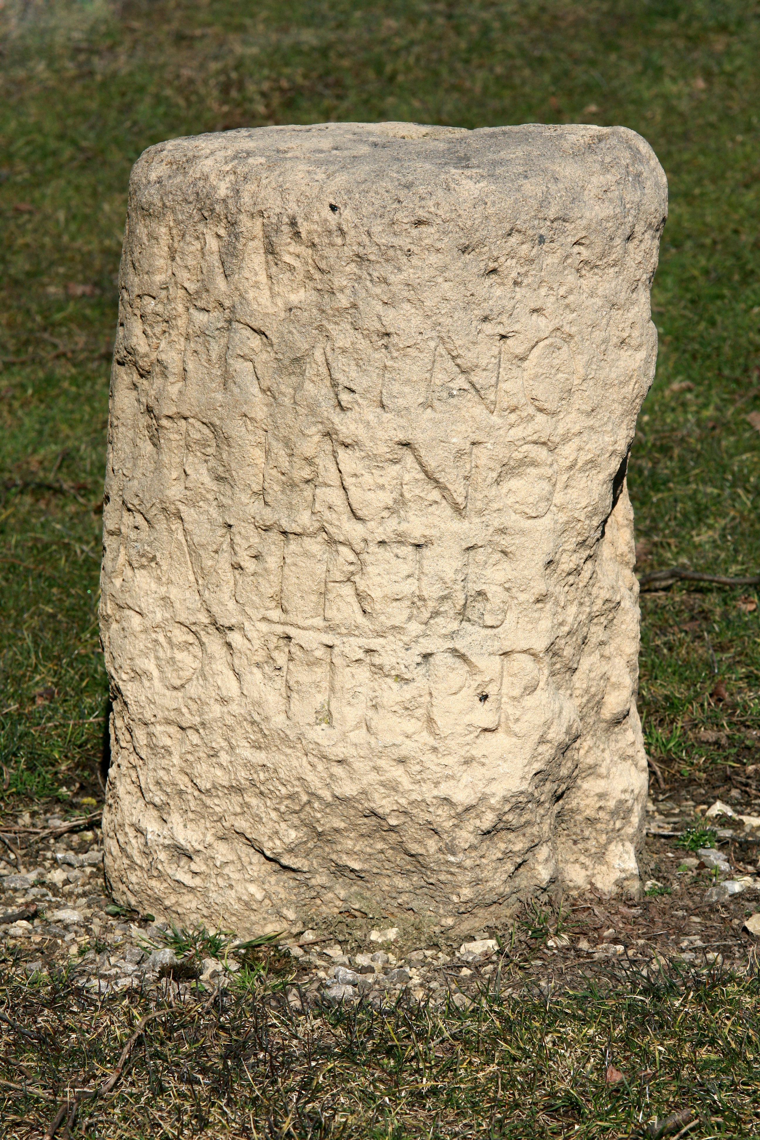 Moulage de la borne découverte en 1640 attestant la présence d'une voie romaine lors de la construction du canal d'Entreroches.